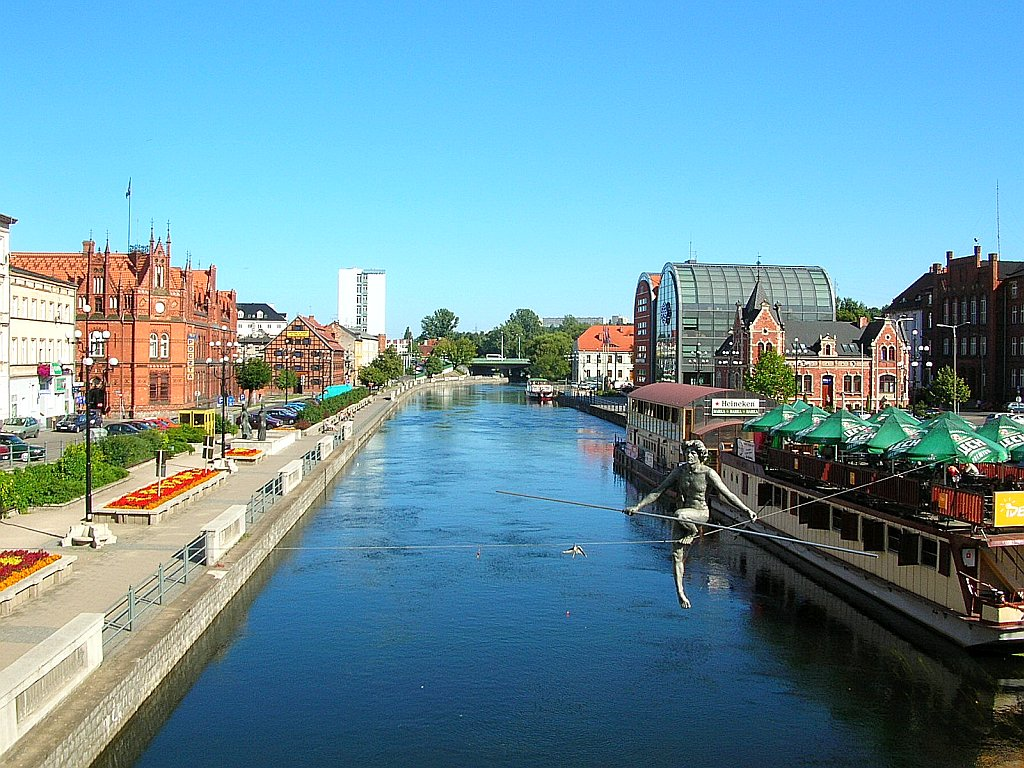 Widok z Mostu Staromiejskiego